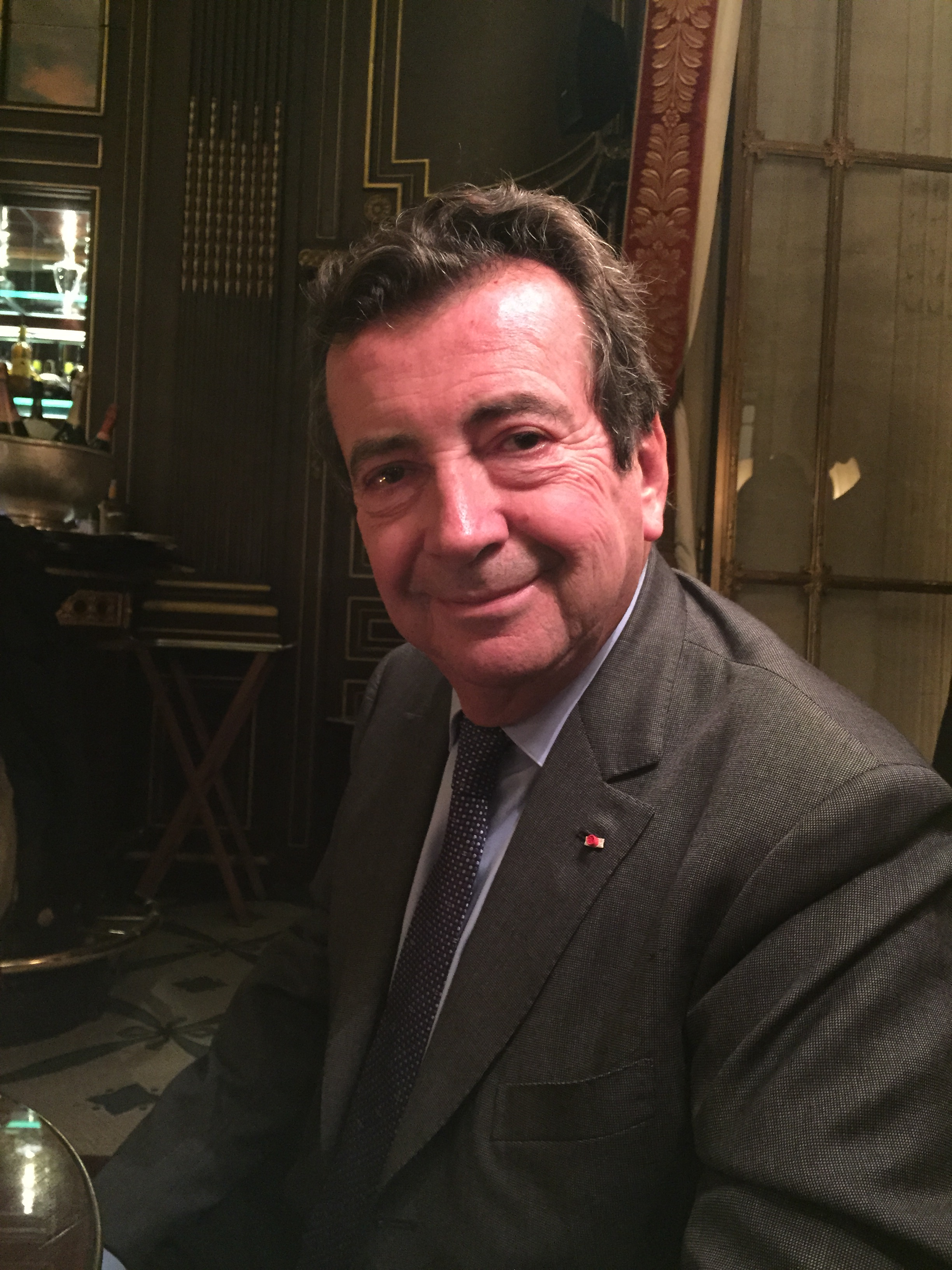 Philippe Faure, Diplomate